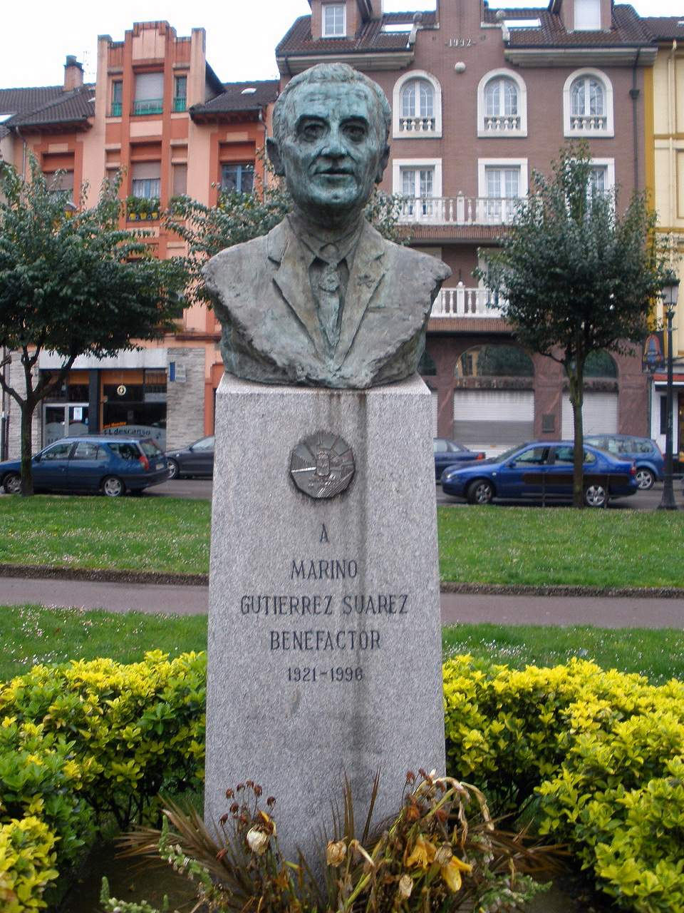 La Felguera de Langreo (Asturias)